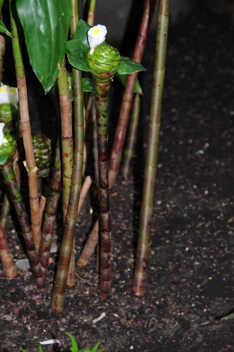 Costus dubius, Palmengarten, Frankfurt am Main, Hessen, Deutschland